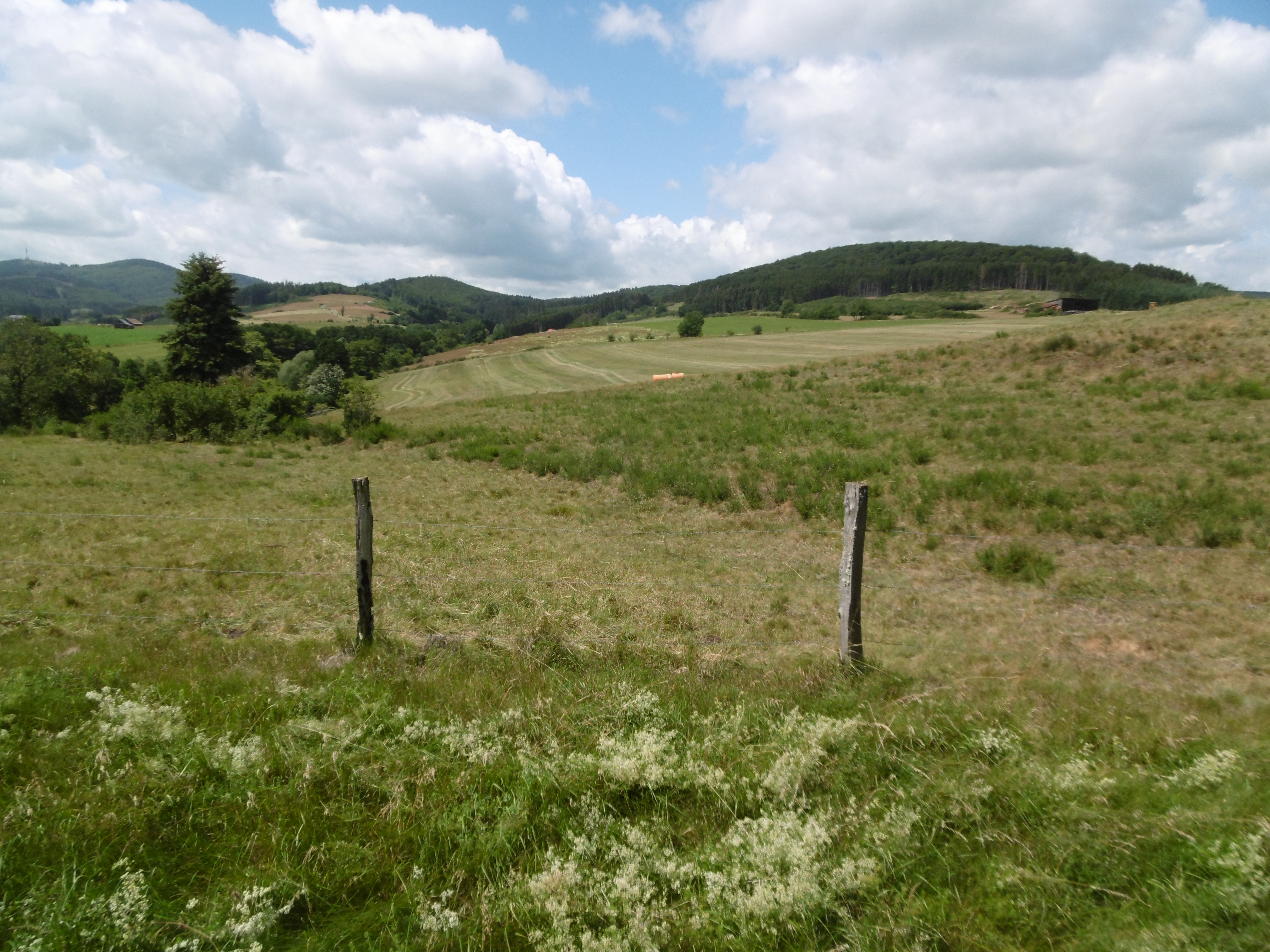 Naturschutzgebiet Auf dem Knapp, hinten Landschaftsschutzgebiet Medebacher Kernraum: Quellmulden, Niederungszonen und Flächhänge (Offenland); Landschaftsschutzgebiet Medebach und Naturschutzgebiet waldreservat Glindfeld (Wald)​.